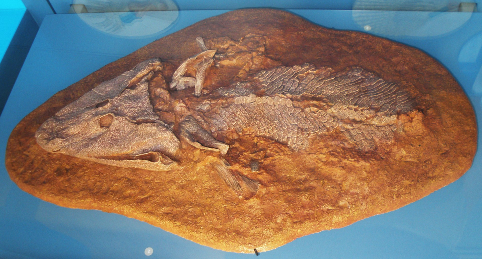 Fossil of Tiktaalin, an extinct fish Took the photo at Musee d'Histoire Naturelle, Brussels